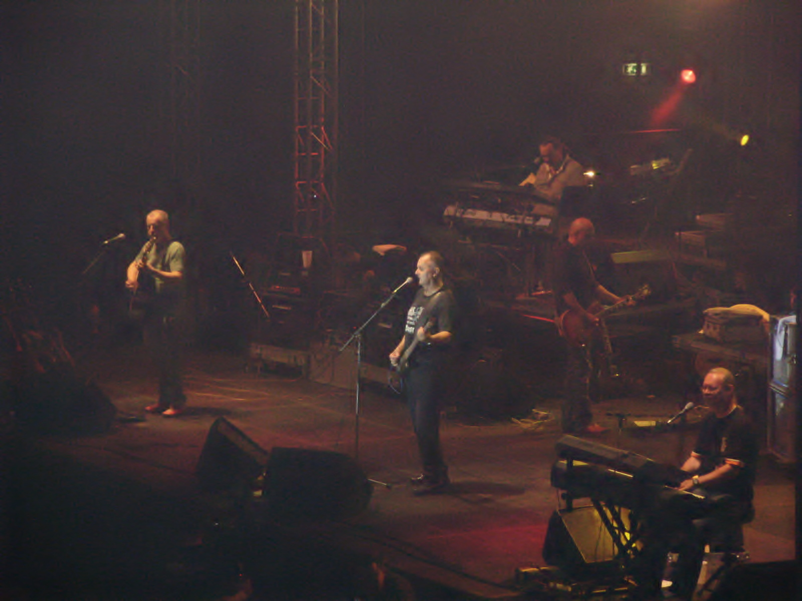 skupina Elán - koncert Pardubice